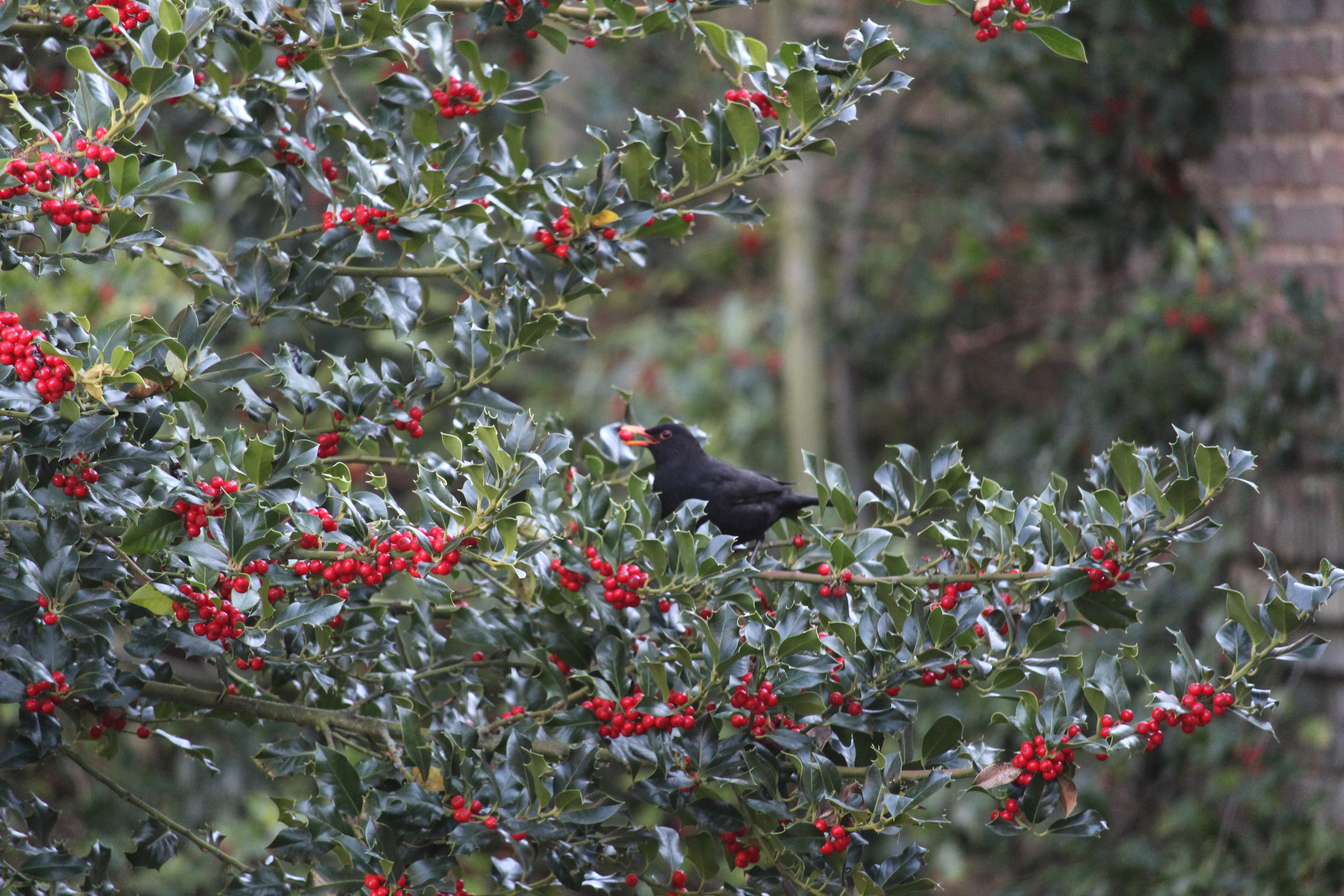 Merle noir dans un houx à Saint-Quentin